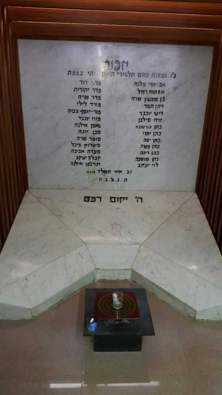 האנדרטה בתוך הספרייה בבית הספר במעלות